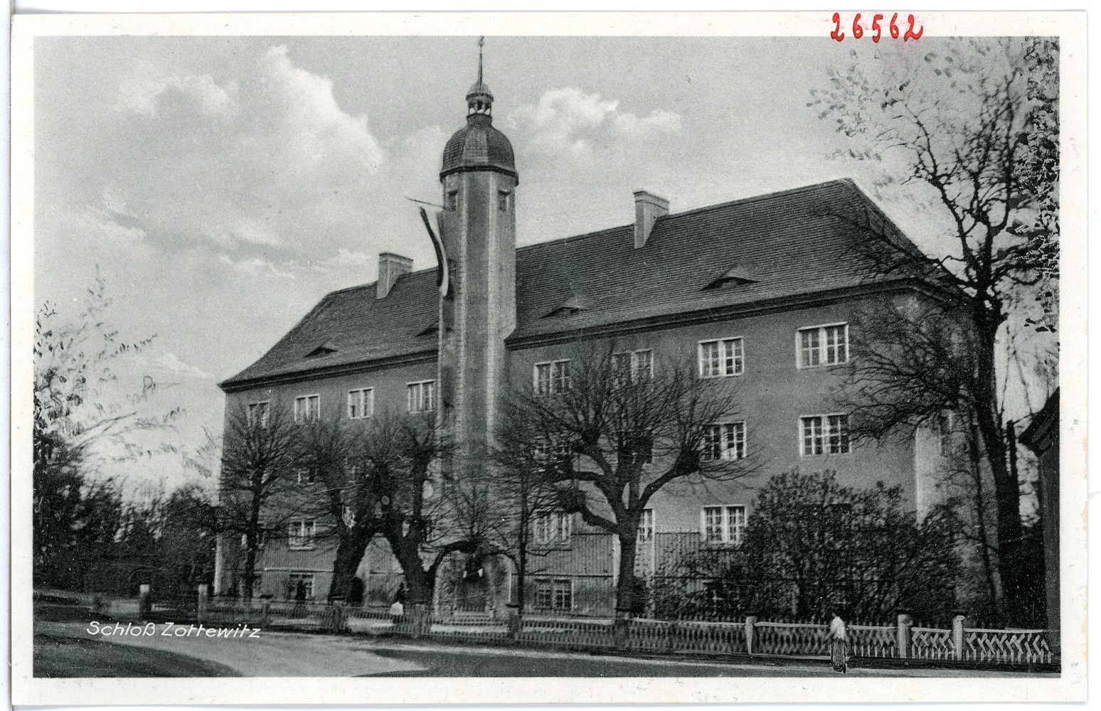 Zottewitz; Schloß This postcard is from publisher Brück & Sohn in Meißen ( postcard has a unique number 26562 and is available in a higher resolution at the publisher. This images was uploaded in a cooperation project between Wikipedians and the publisher.